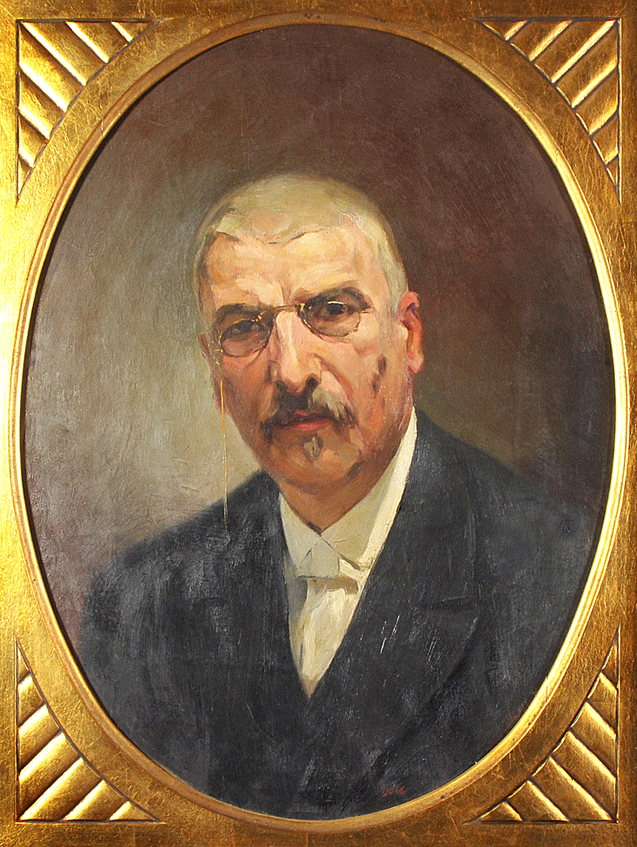 Retrat de Josep Pollés i Oliver (alcalde de Vilanova). pintura sobre tela. Biblioteca Museu Víctor Balaguer